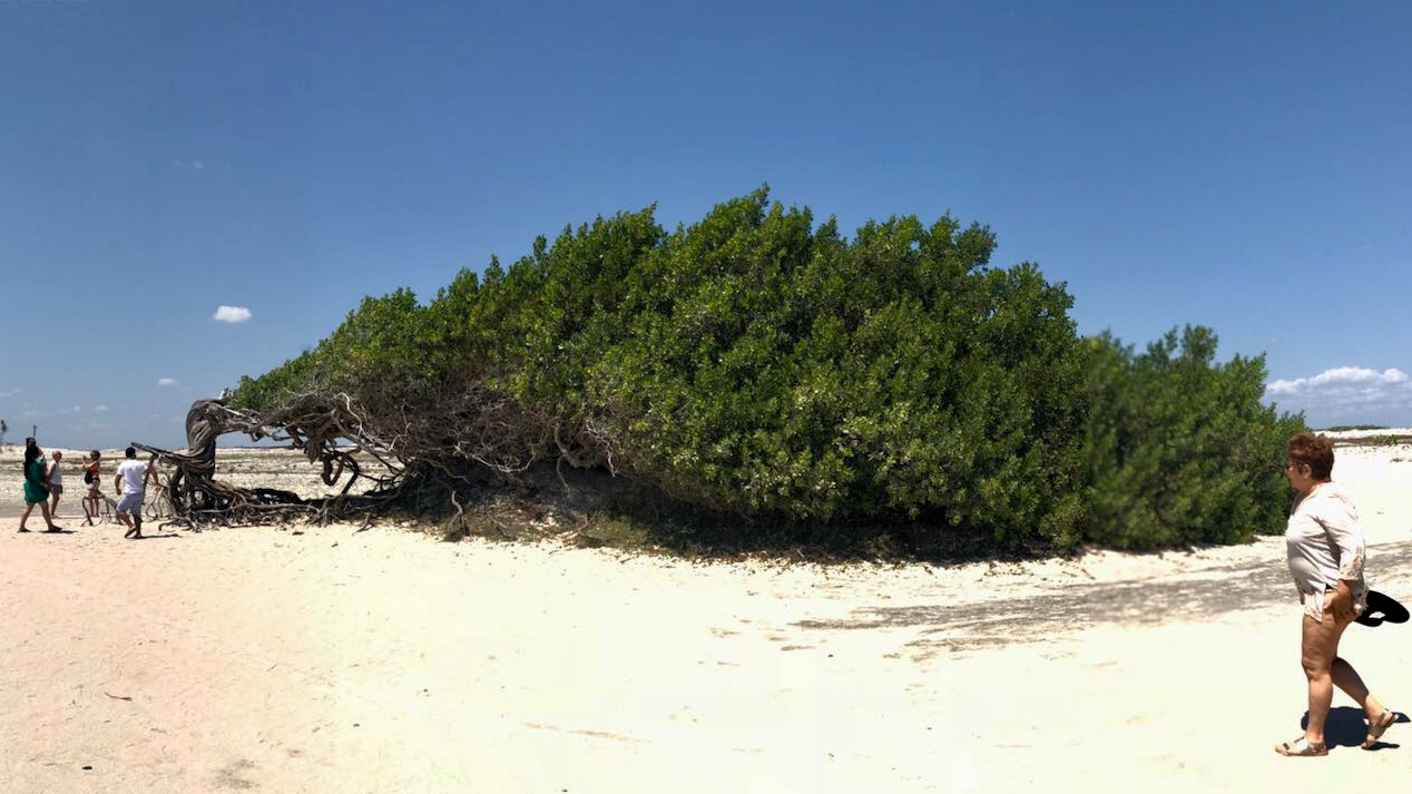 Conocarpus etectus couché par le vent à Jericoacoara au Brésil